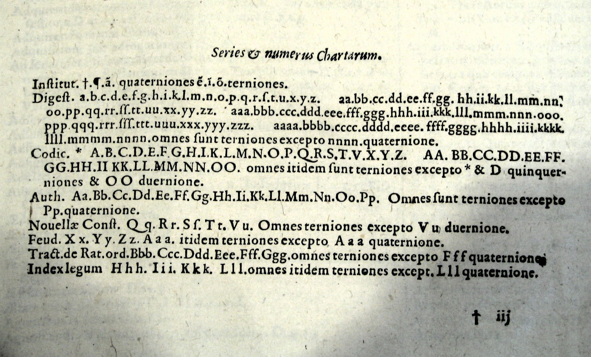 Registro de pliegos en Godefroy, Denis (1607), Corpus Iuris Civilis